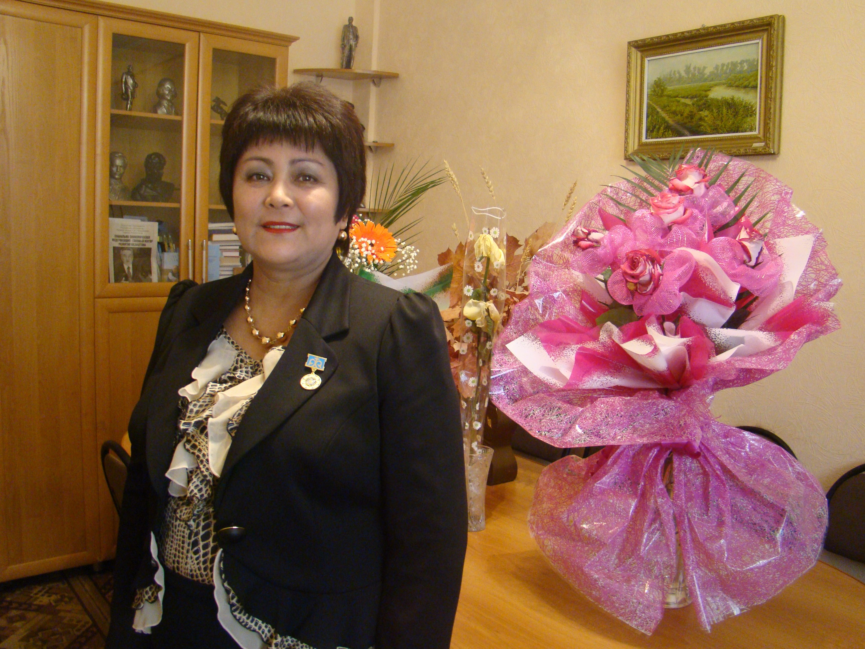 директор областной универсальной научной библиотеки им. Л. Толстого удостоена почетного знака «Мәдениет қайраткері Министерства культуры РК, 2012 г.